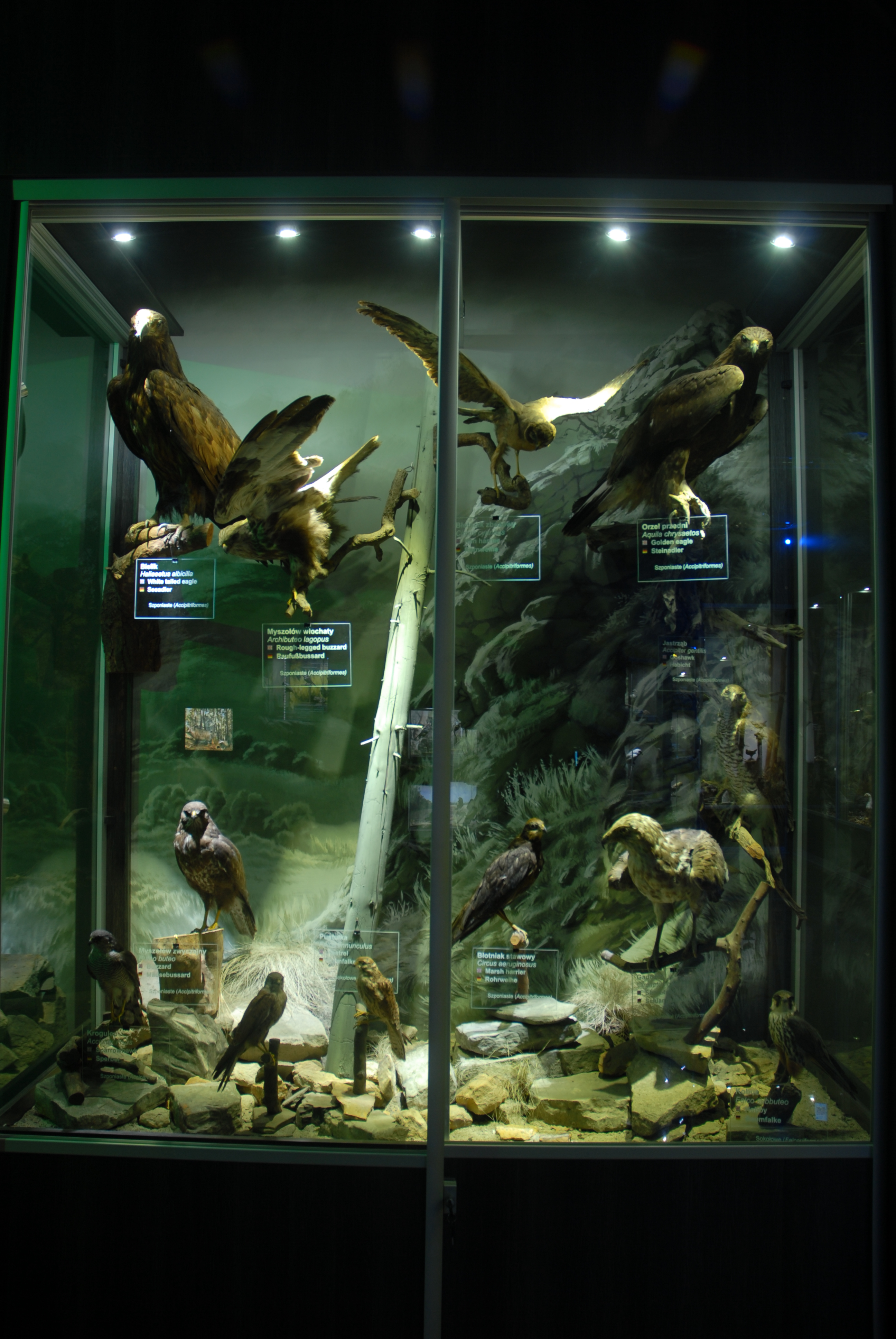 Ptaki szponiaste